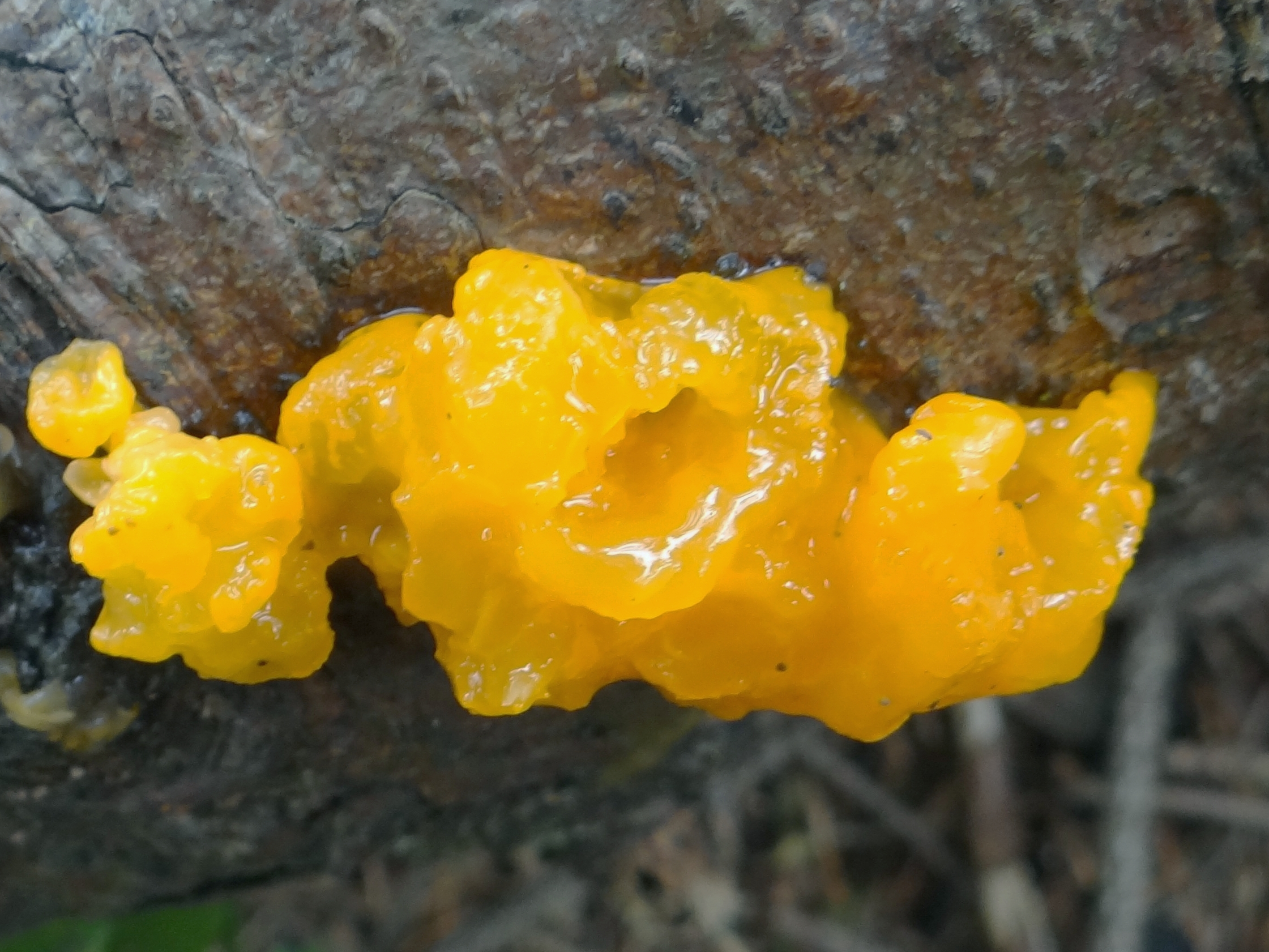 Dacrymyces chrysospermus (Position: Poland, Bezkid Żywiecki, Babia Góra, las powyżej Markowych Szczawin. Habitat: Abies alba)